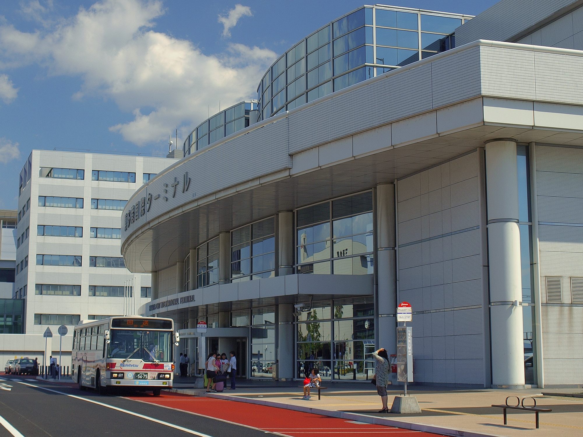 福岡市にある博多港の国際ターミナル。2010年8月7日撮影。